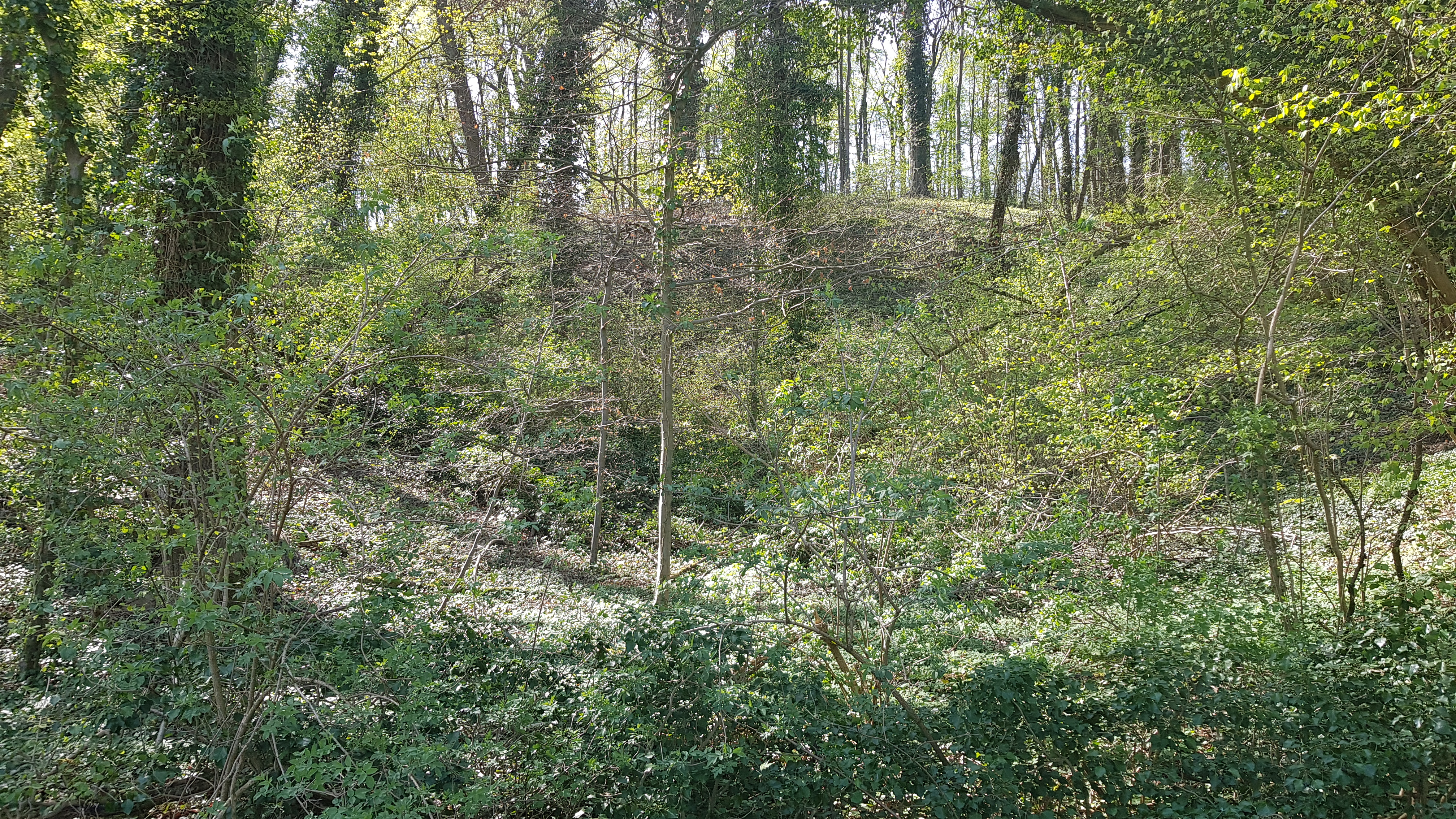 Groeve Pruus Karel III in Biebosch, Valkenburg, Nederland